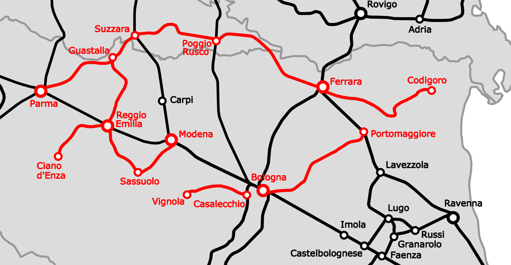 La rete delle Ferrovie Emilia Romagna